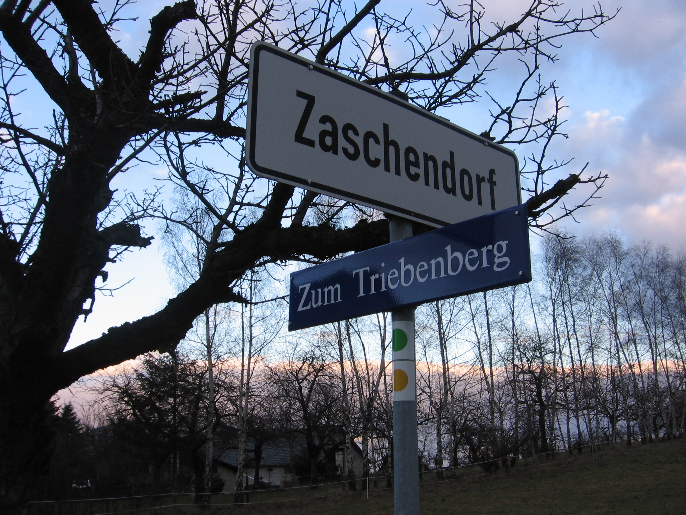 Ortseingang Zaschendorf